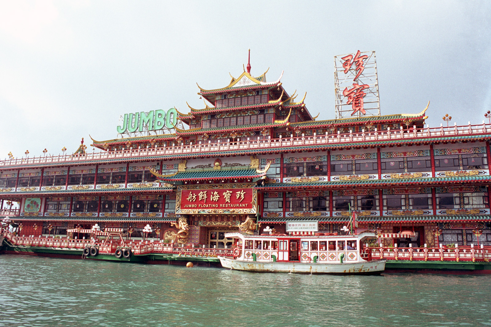 006-042m